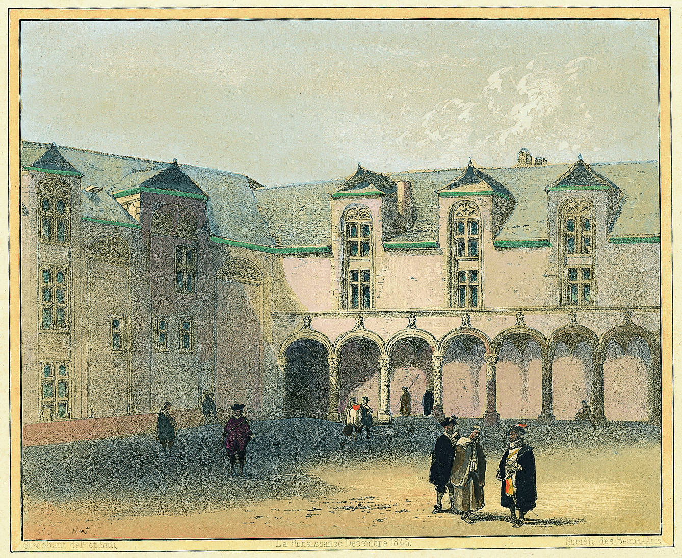 Seconde cour du palais des Prince-évêques de Liège au XVIIIe siècle